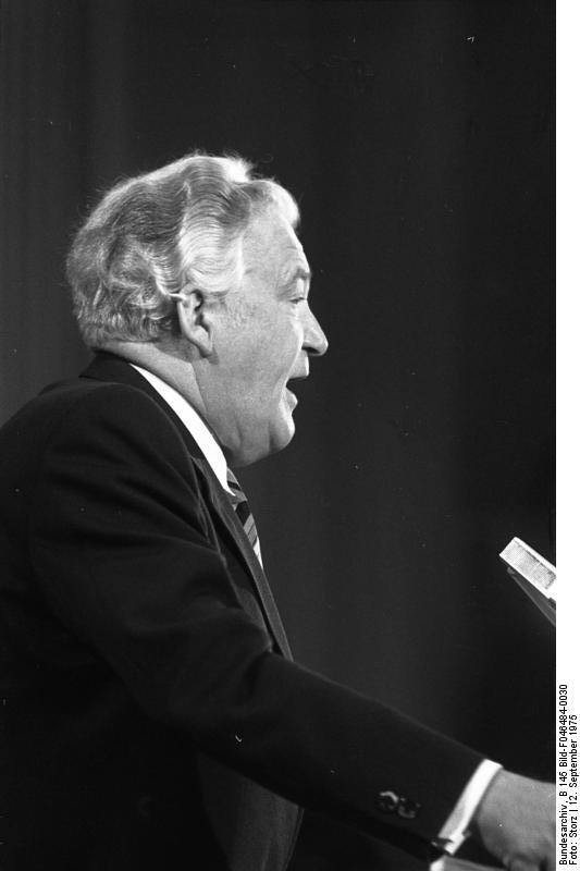 CSU-Parteitag 1975 in der Bayernhalle, München